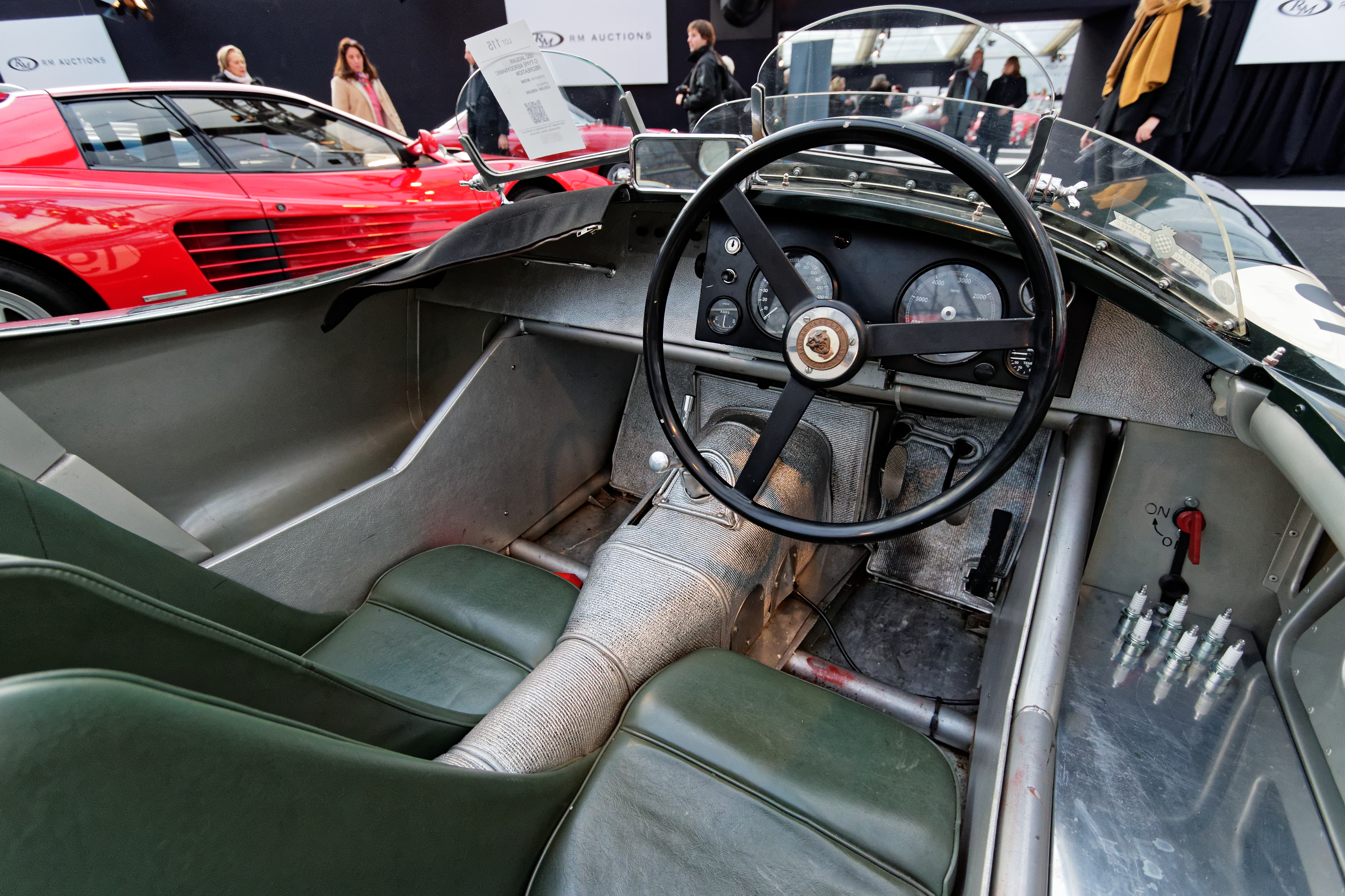 La vente aux enchères RM auctions aux pied des Invalides à Paris le 4 février 2015.